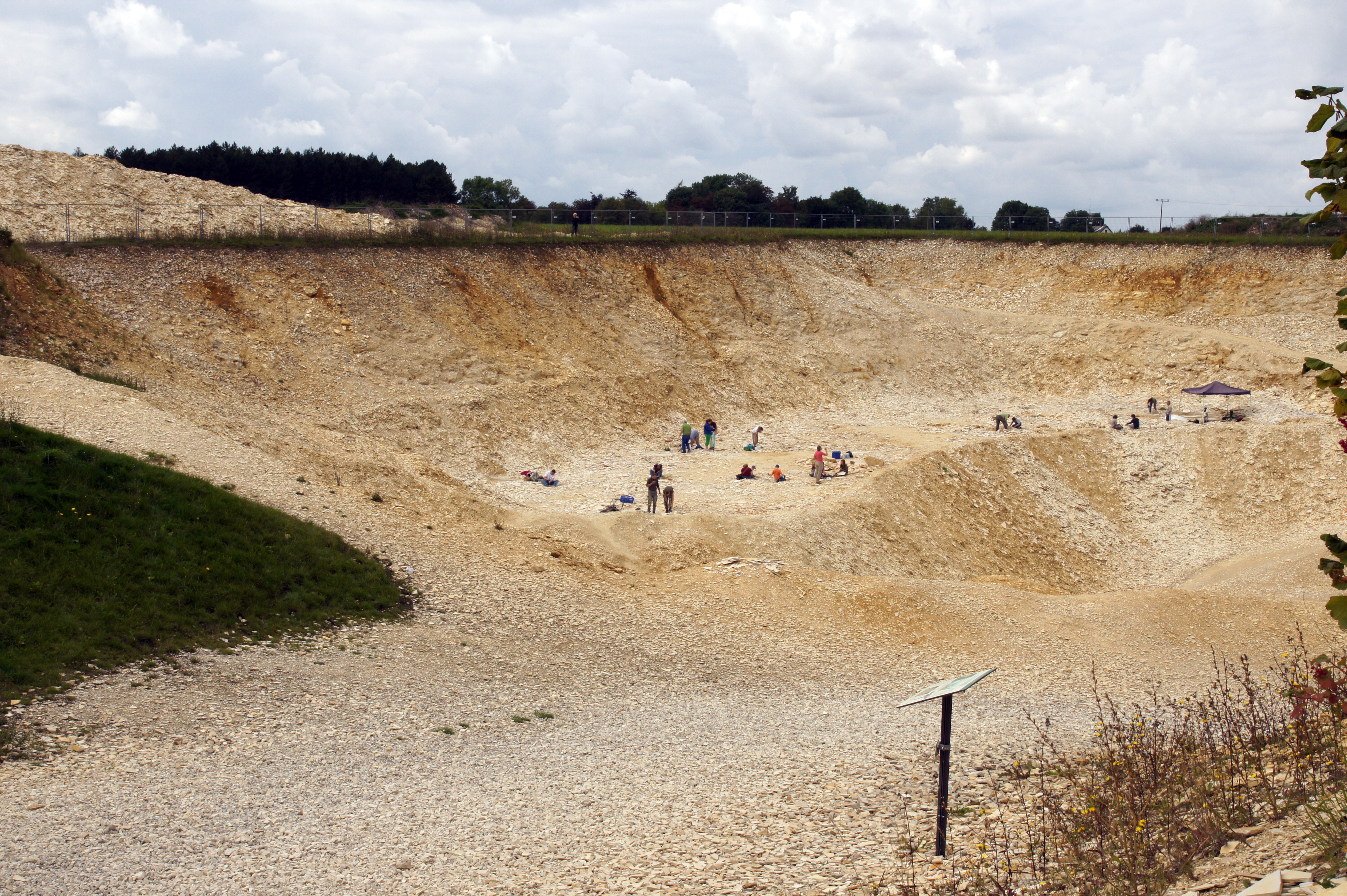 Steinbruch für Fossiliensammler am Blumenberg, nahe Kinderdorf Marienstein, mit Lehrpfad zur Geschichte des Steinabbaus